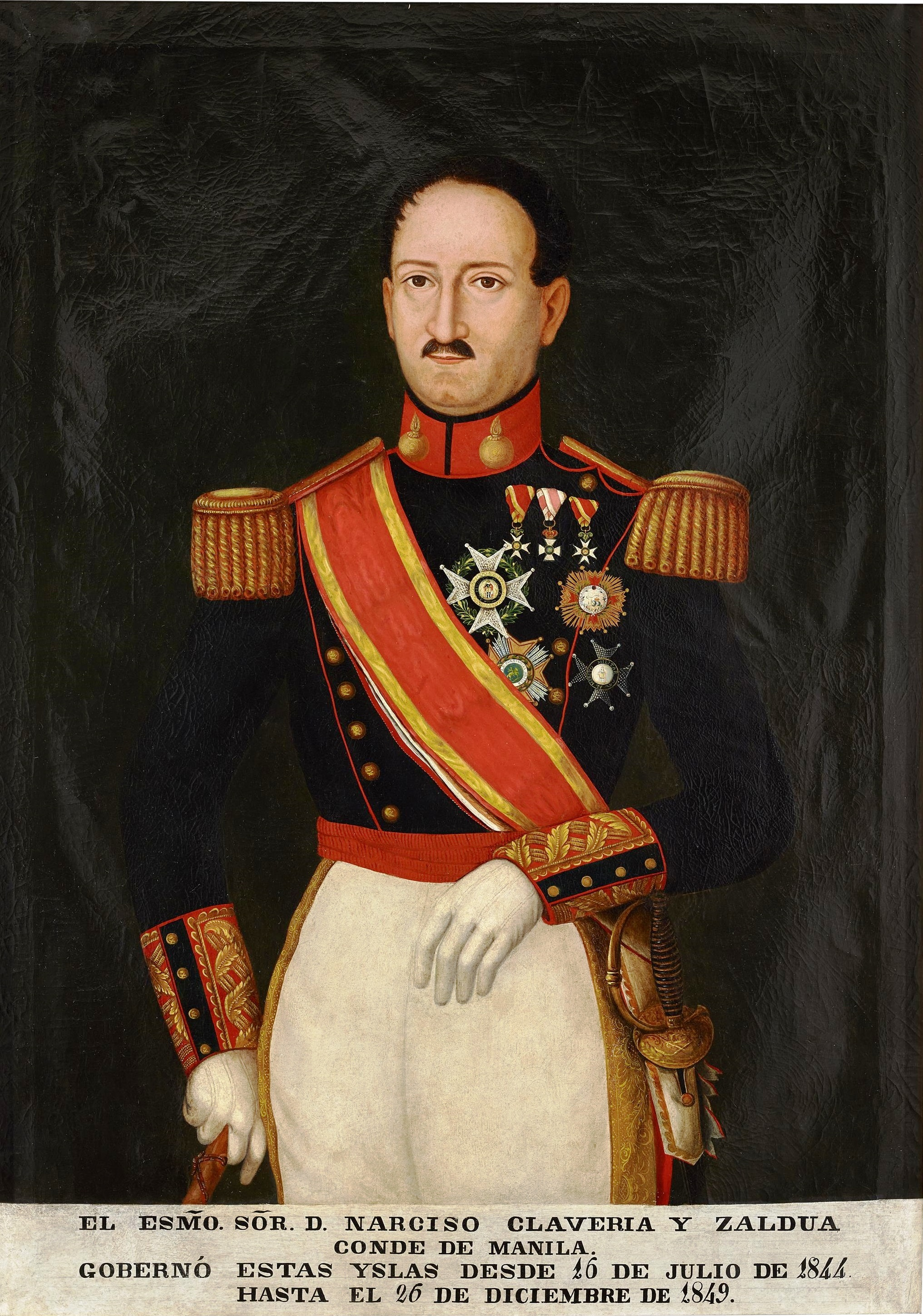 Retrato del militar y político español Narciso Clavería y Zaldúa (1795-1851), primer conde de Manila, teniente general del ejército español, y capitán general de